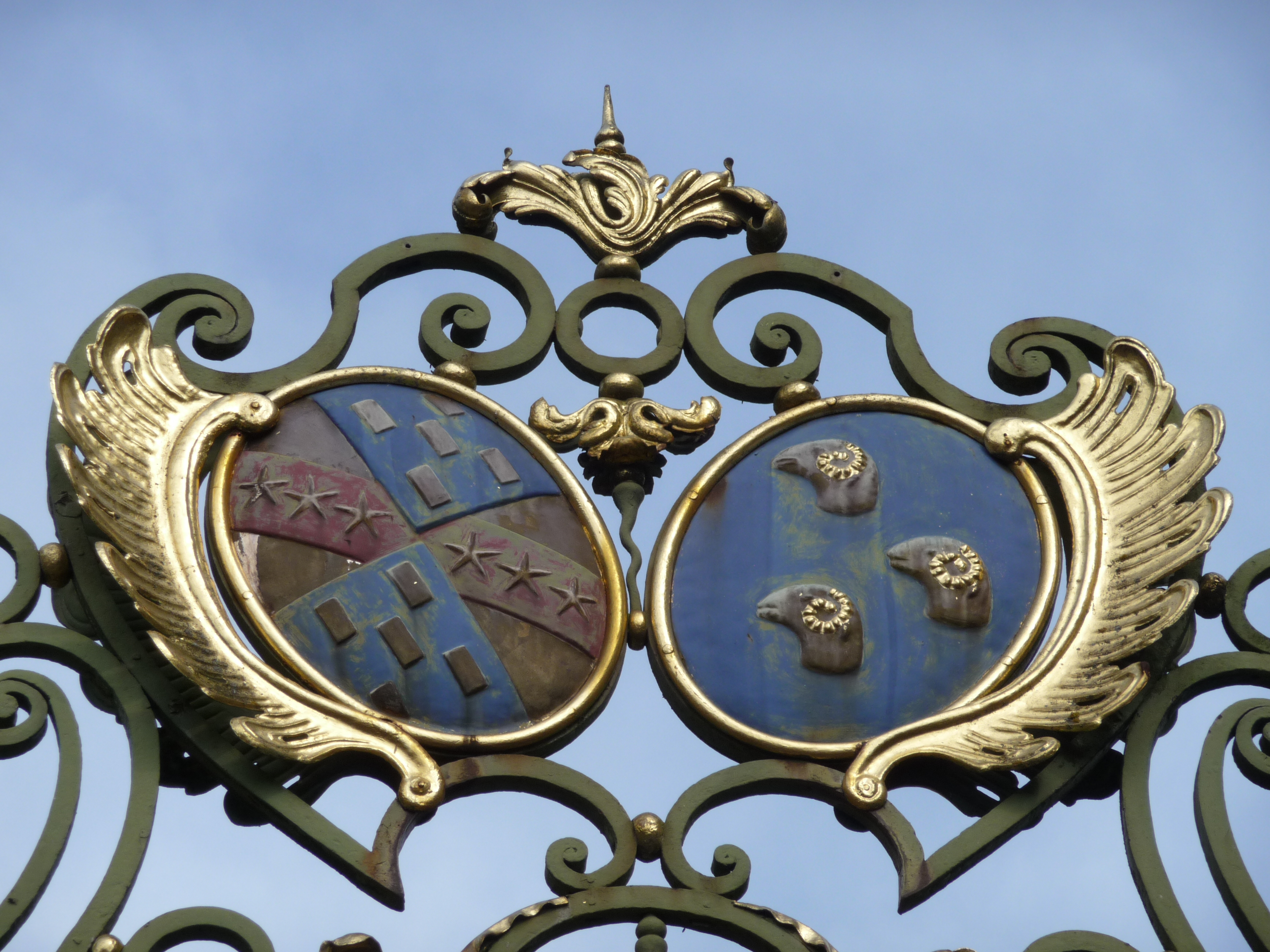 Château de Montbard. Armoiries d'alliance de Georges-Louis Leclerc de Buffon (1707-1788) et de Marie Françoise de Saint-Belin (1732-1769) : Écartelé, aux 1 et 4 d'argent à la bande de gueules chargée de trois étoiles d'or (qui est Leclerc), et aux 2 et 3 d'azur à cinq billettes d'argent posées en sautoir (qui est de Marlin) ; et d'azur à trois têtes de bélier d'argent accornées d'or (qui est de Saint-Belin).